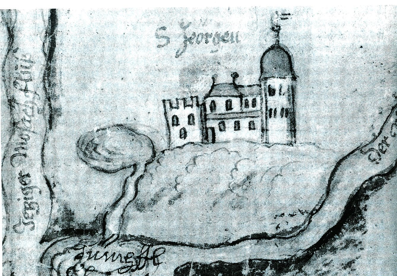 Darstellung der Burg von St. Georgen an der Salzach